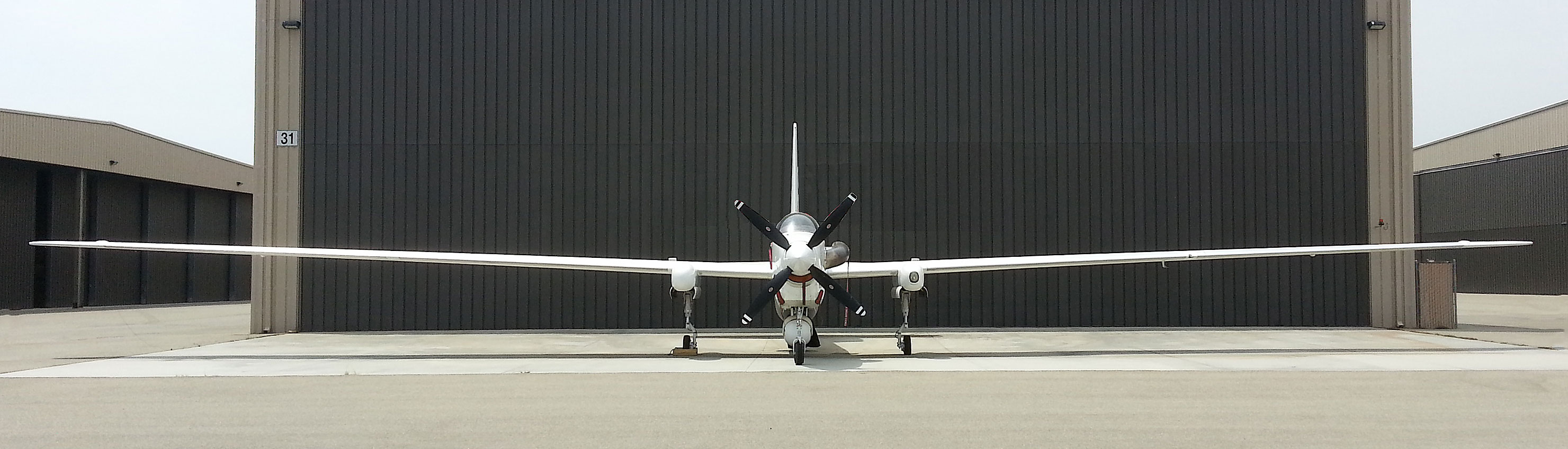 Grob G520 Front View